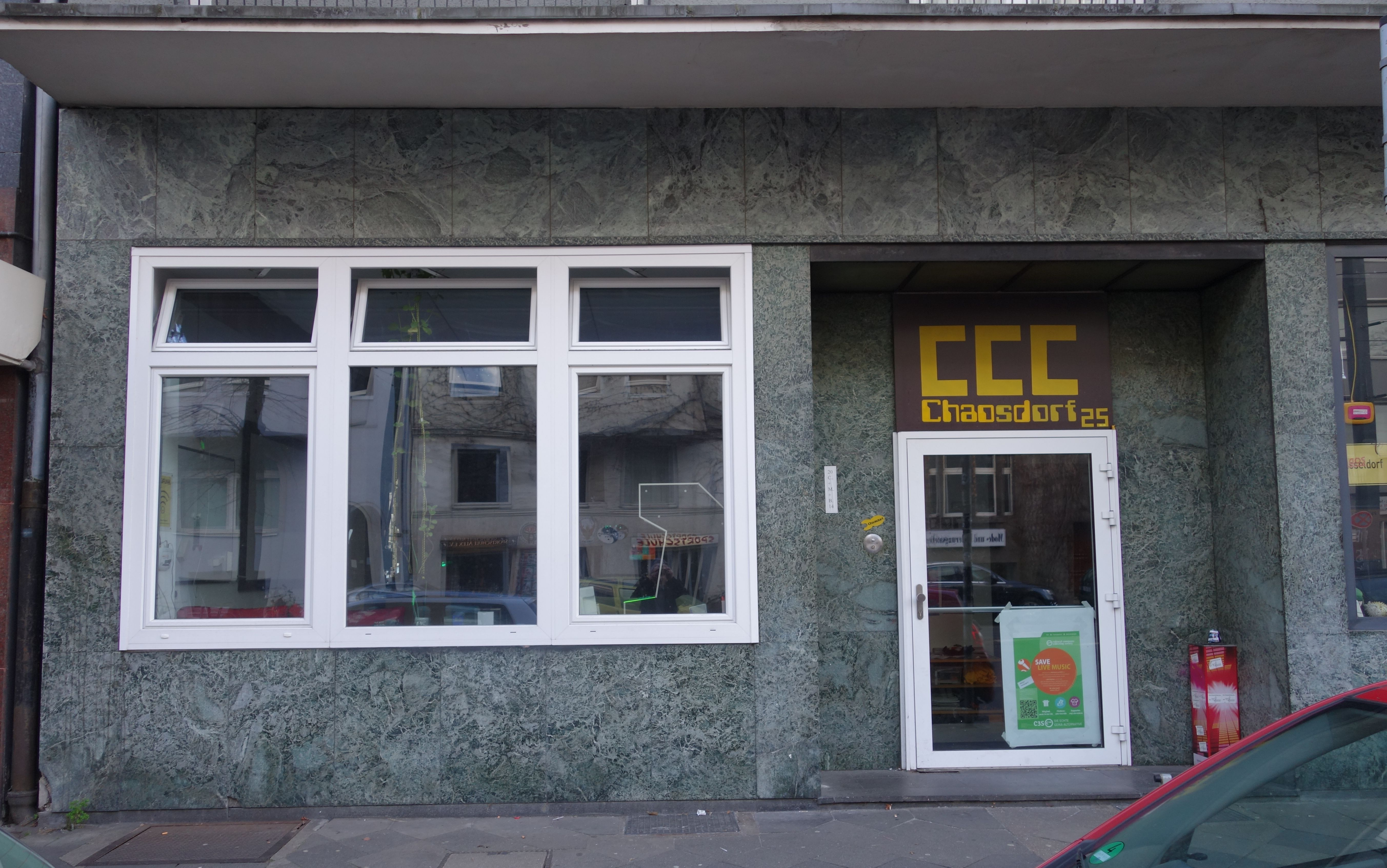 Düsseldorf, Hüttenstraße 25, CCC Chaosdorf 25, März 2015.